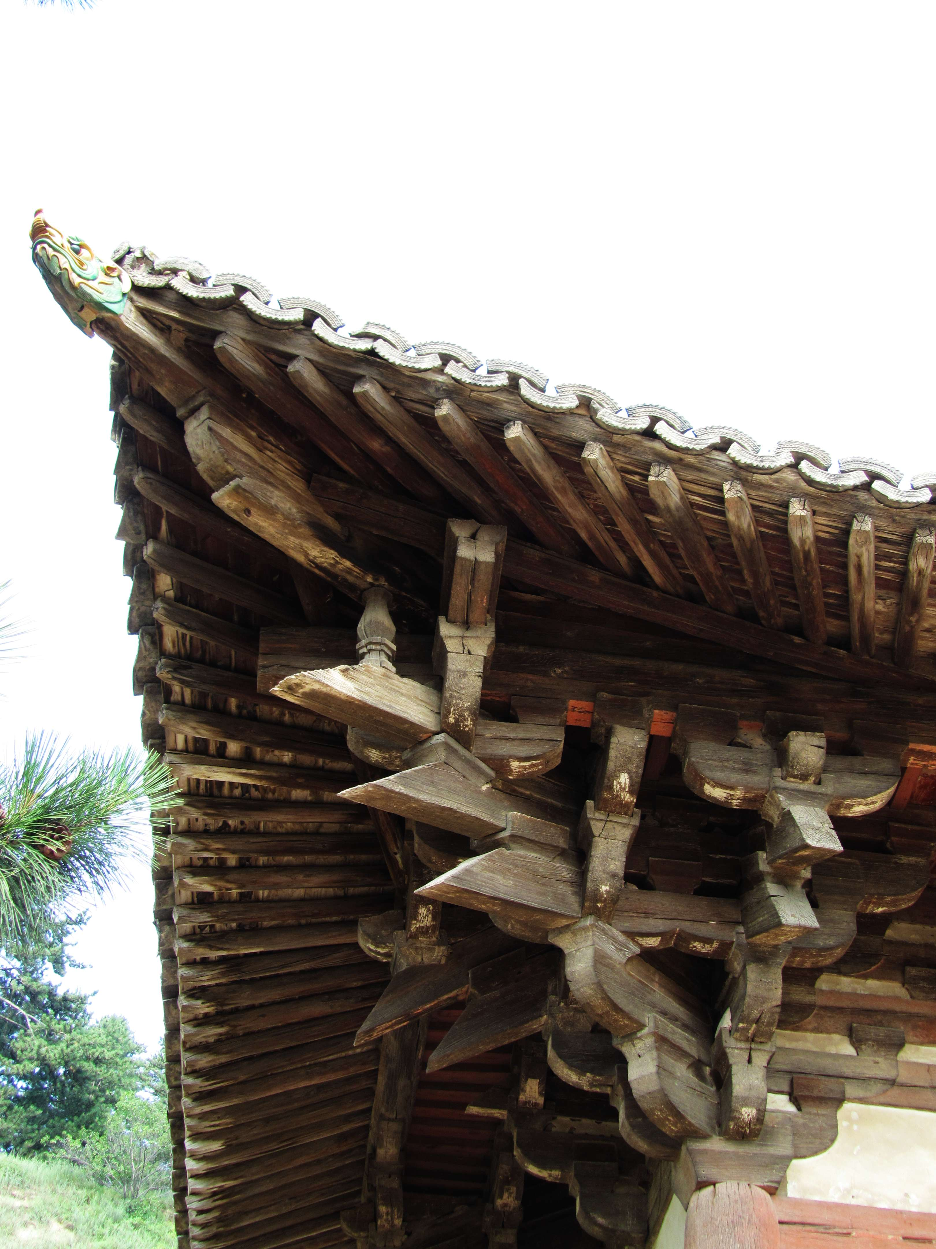 山西五台山佛光寺东大殿转角铺作。